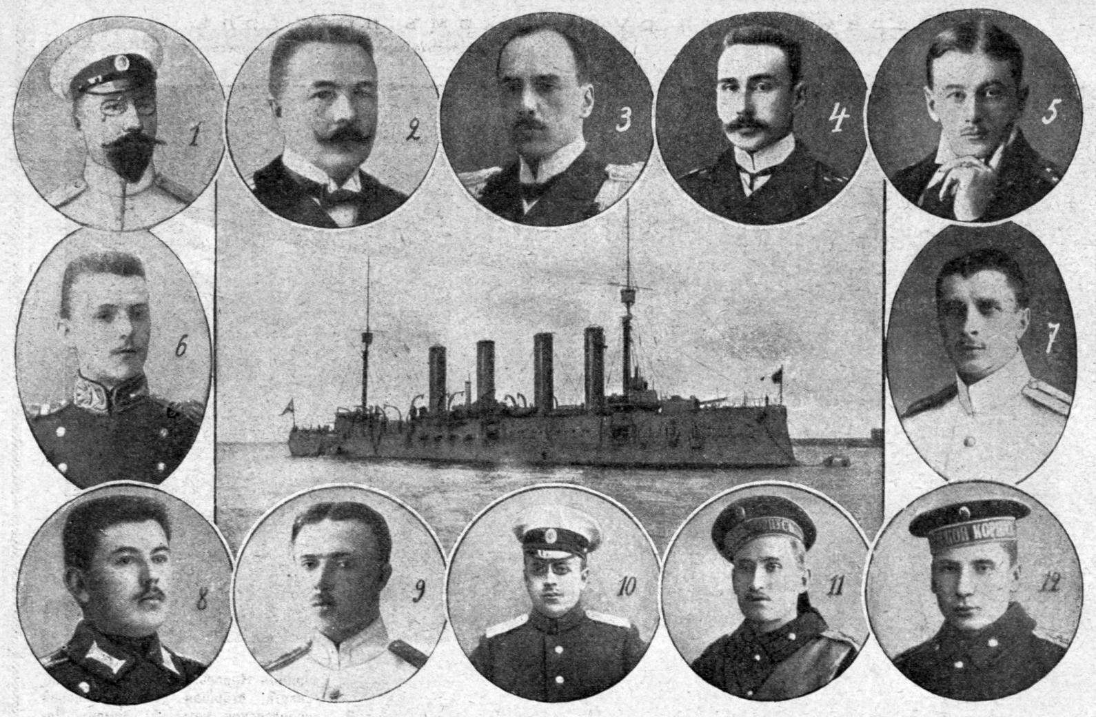 Крейсер "Паллада", взорванный 28 сентября в Балтийском море минами германских подводных лодок и затонувший со всем своим личным составом. 1. Командир крейсера "Паллада", капитан 1-го ранга С.Р. Магнус; 2. Капитан 1-го ранга А.А. Дешевов; 3. Подполковник военно-морского судебного ведомства С.И. Сикорский; 4. Лейтенант Л.А. Гаврилов 2-й; 5. Лейтенант Ю.К. Быков 3-й; 6. Лейтенант К.С. Бутомо; 7. Лейтенант А.И. Студницкий; 8. Мичман Н.А. Коленда; 9. Мичман Г.Г. Цывинский; 10. Младший врач Г.Г. Сильверсван; 11. Корабельный гардемарин Н.Е. Свешников; 12. Мичман Л.М. Издебский